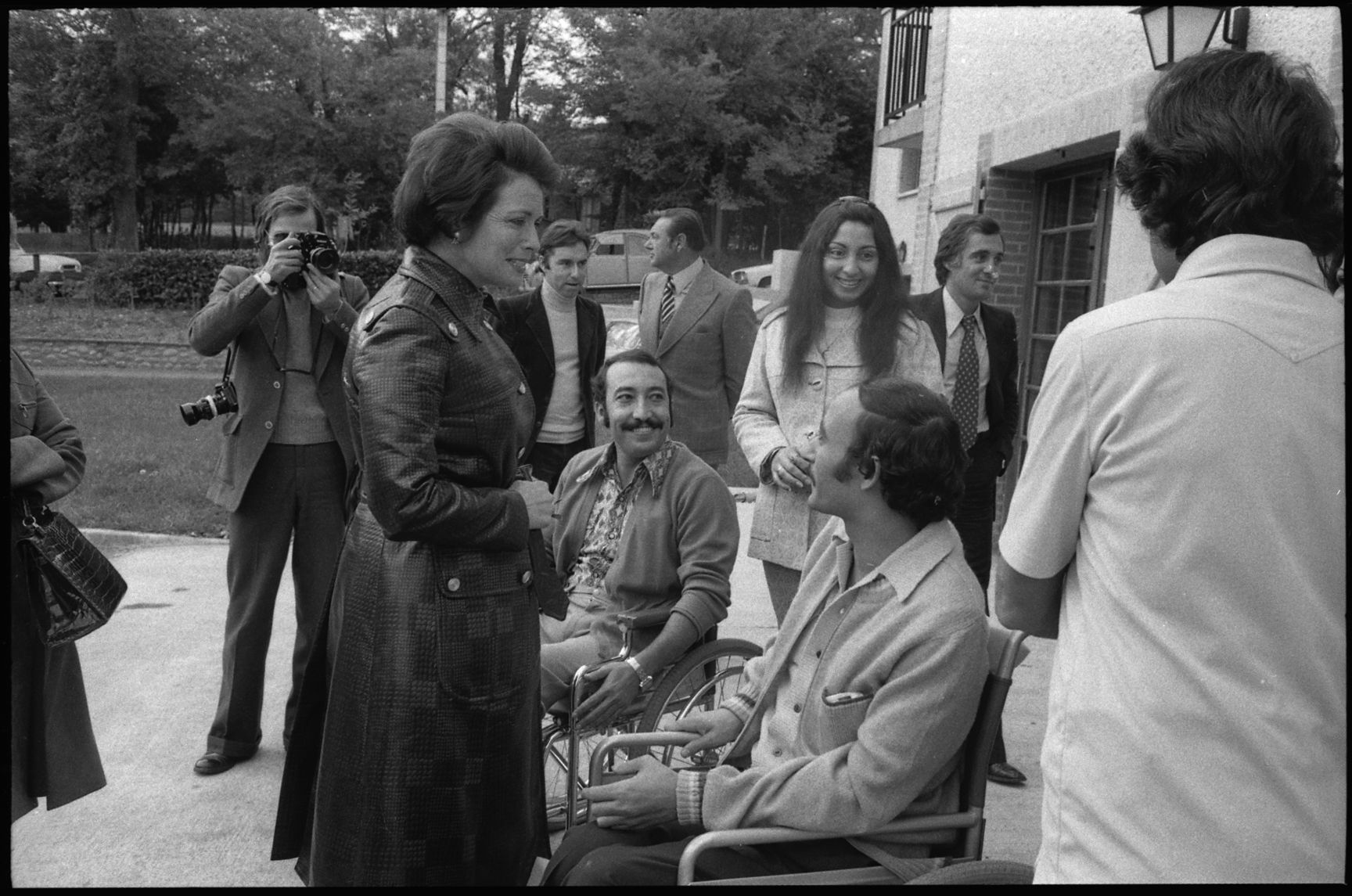 Clinique de Verdaich à Gaillac-Toulza (Haute-Garonne). 15 Octobre 1974. Vue de Jihane el-Sadate, épouse du président de la République arabe d'Egypte, rendant visite à des blessés de guerre égyptiens à la clinique de Verdaich.